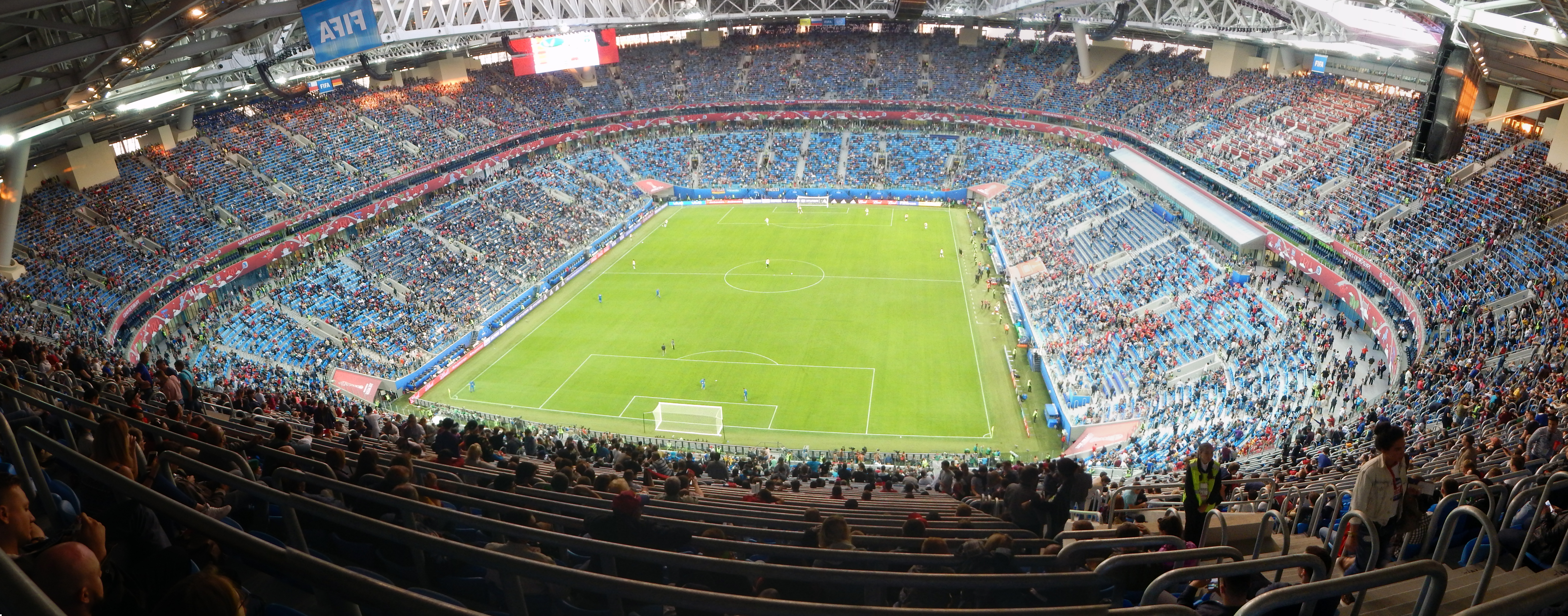 Финал Кубка конфедераций 2017